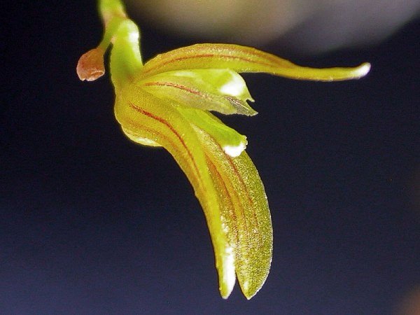 Still needing new combination in Acianthera. Kew has as Pleurothallis